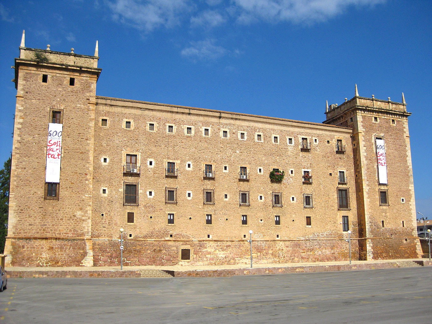 Monastery of Saint Mary of El Puig (Valencia, Spain). Monestir de Santa Maria del Puig, (Horta Nord, País Valencià).